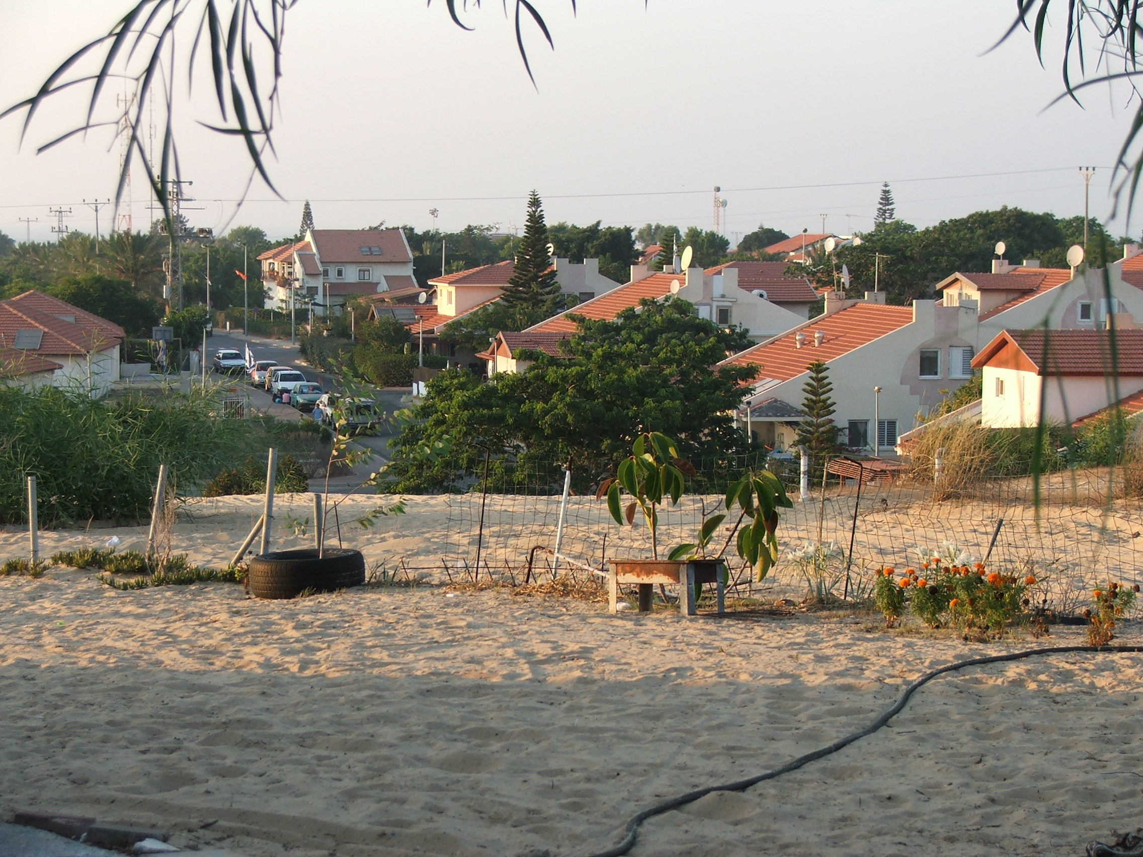 Homes in Neve Dekalim, Gush Katif